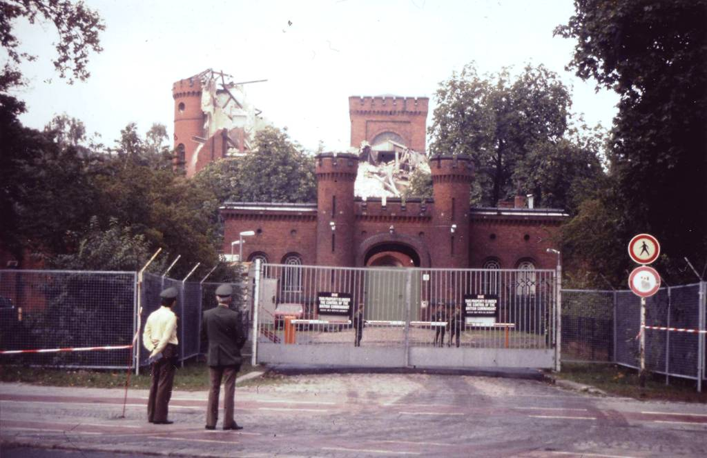 Kriegsverbrechergefängnis Spandau - während des Abrisses